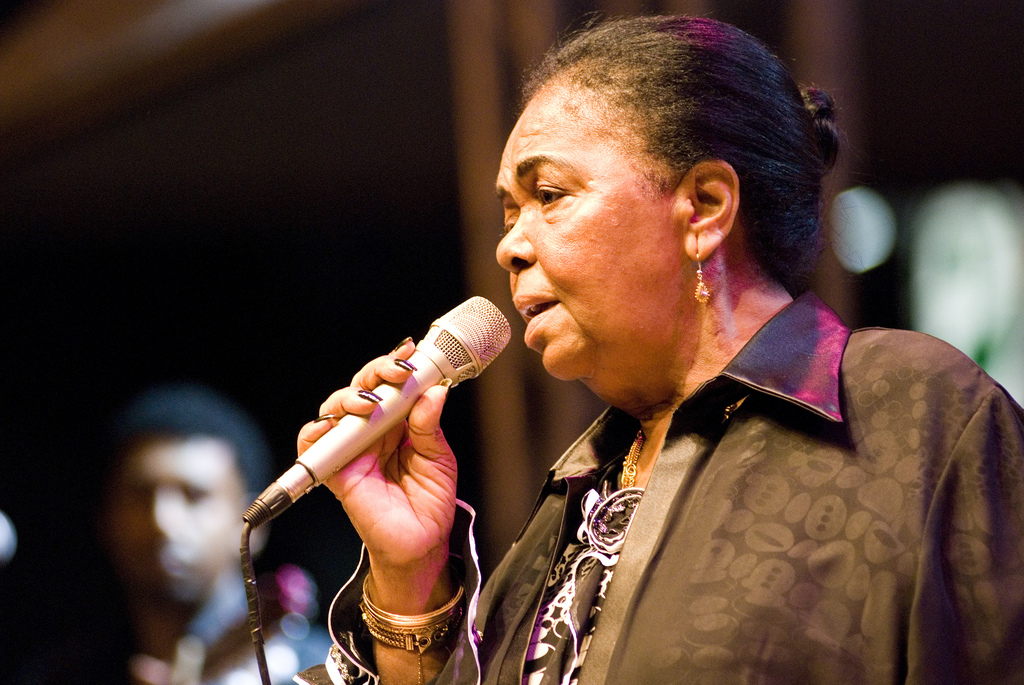 Cesária Évora Foto: Silvio Tanaka.